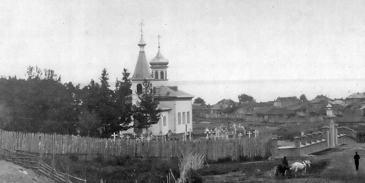 Екатерининская церковь в Петрозаводске.